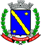 Brasão: Votorantim - municipio do estado de São Paulo.